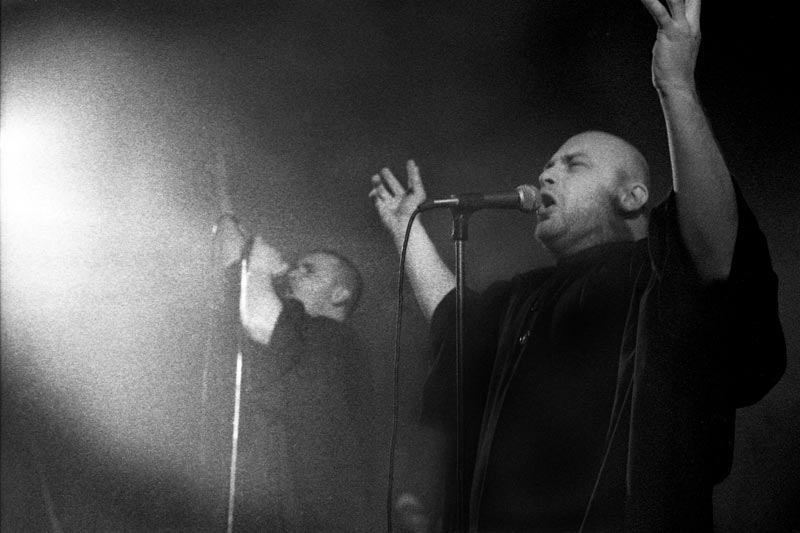 Зоран Маринковић (десно) и Горан Марић (лево) на концерту групе Бјесови, Дом омладине Београда (ДОБ) 1995. Снимио Ранко Томић.